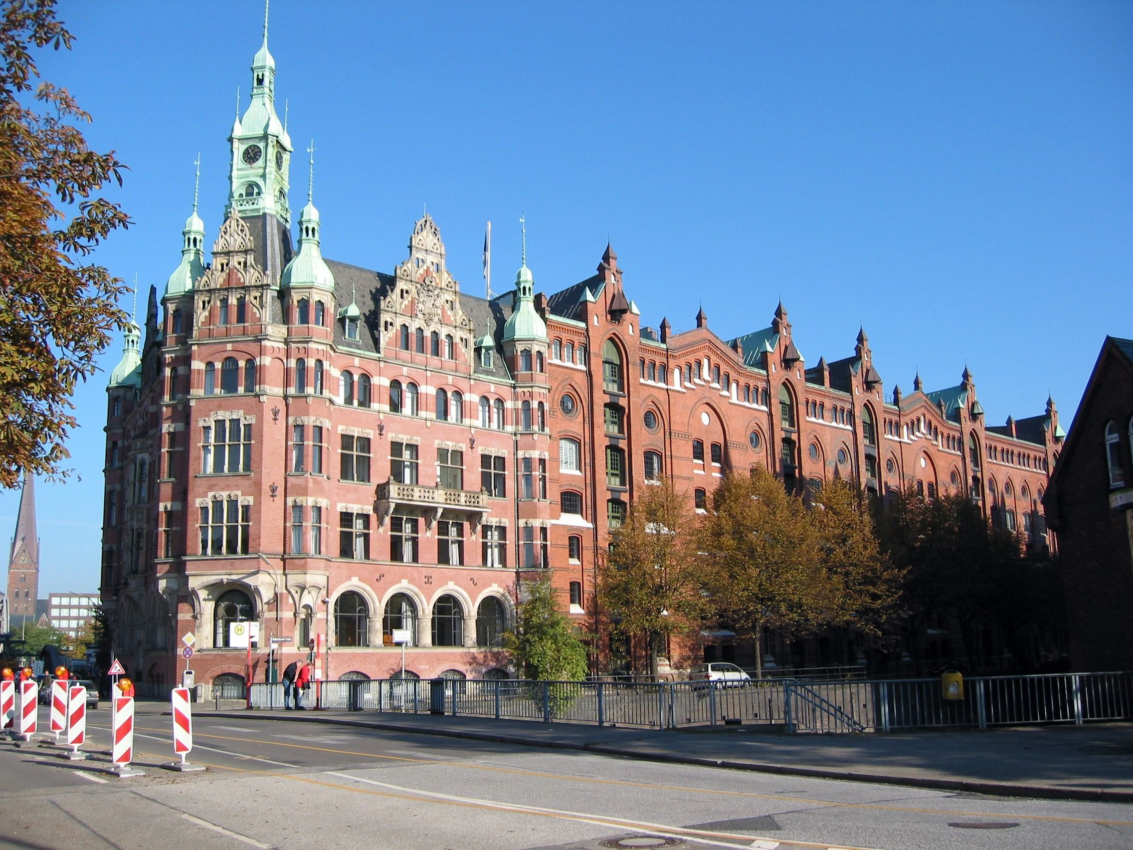 Verwaltung der Hamburger Hafen und Logistik (HHLA) in der Speicherstadt Hamburg.This is a photograph of an architectural monument.